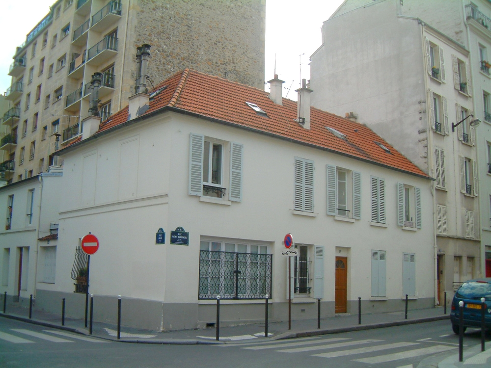 Photo perso de l'angle rue Hallé / rue Rémy Dumoncel, 75014 Paris